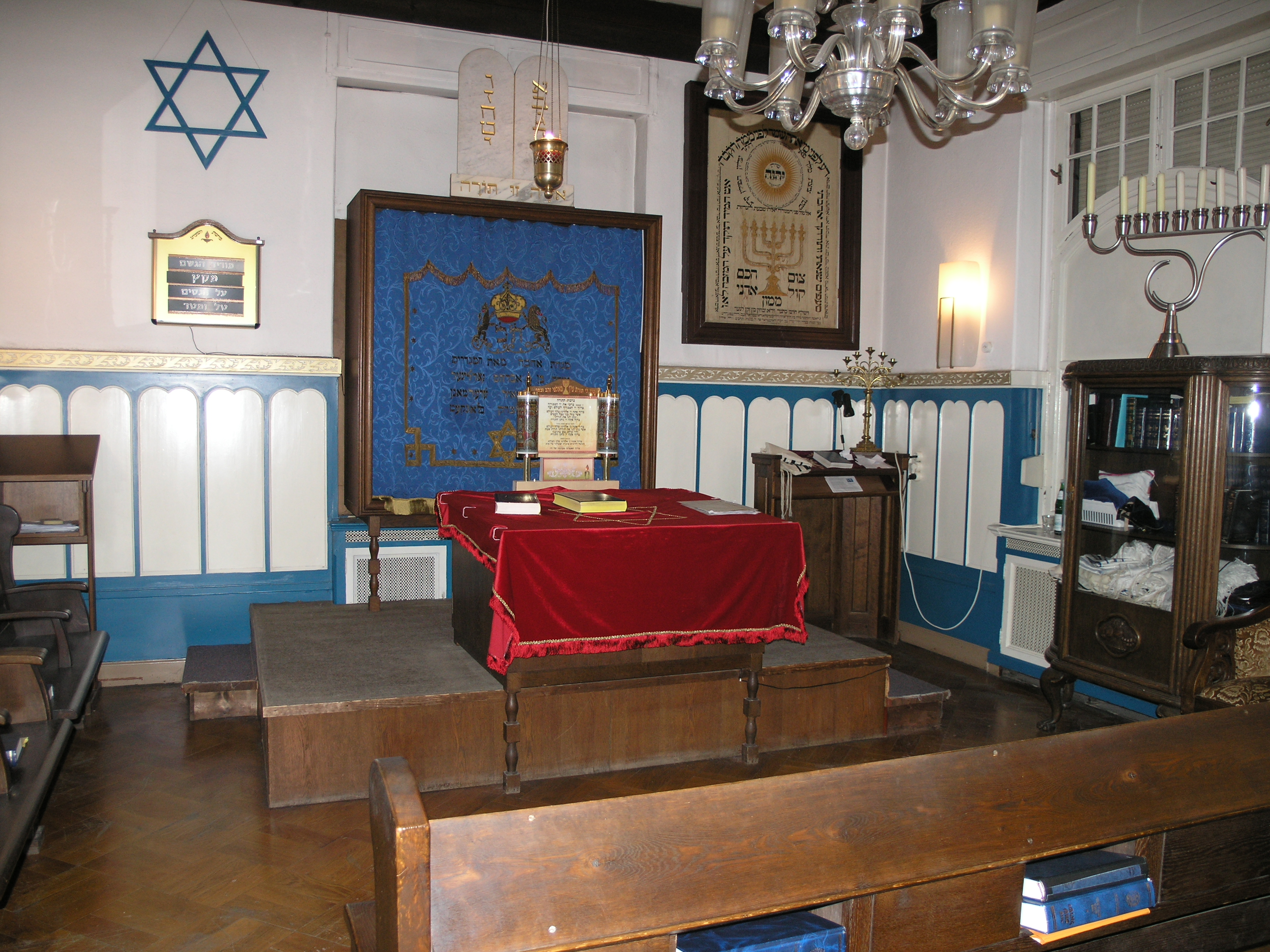 Magdeburg Synagogue